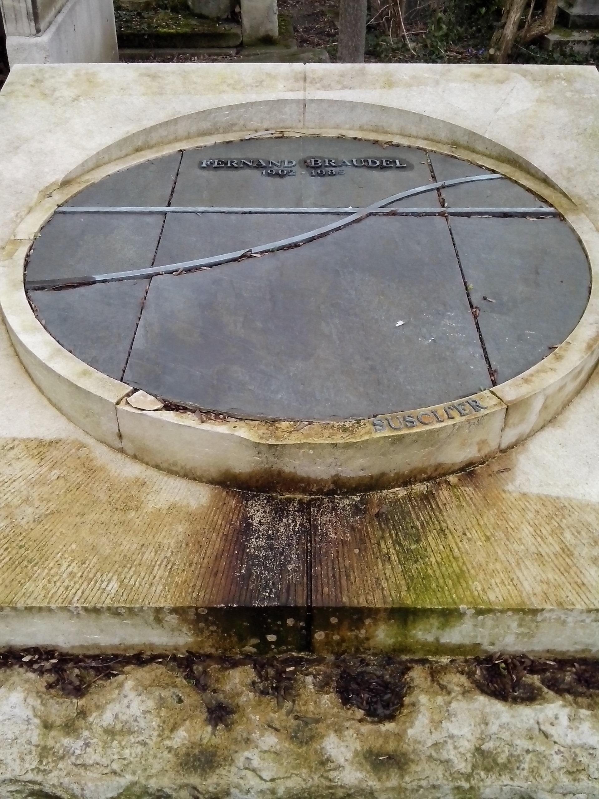 Vue d'ensemble